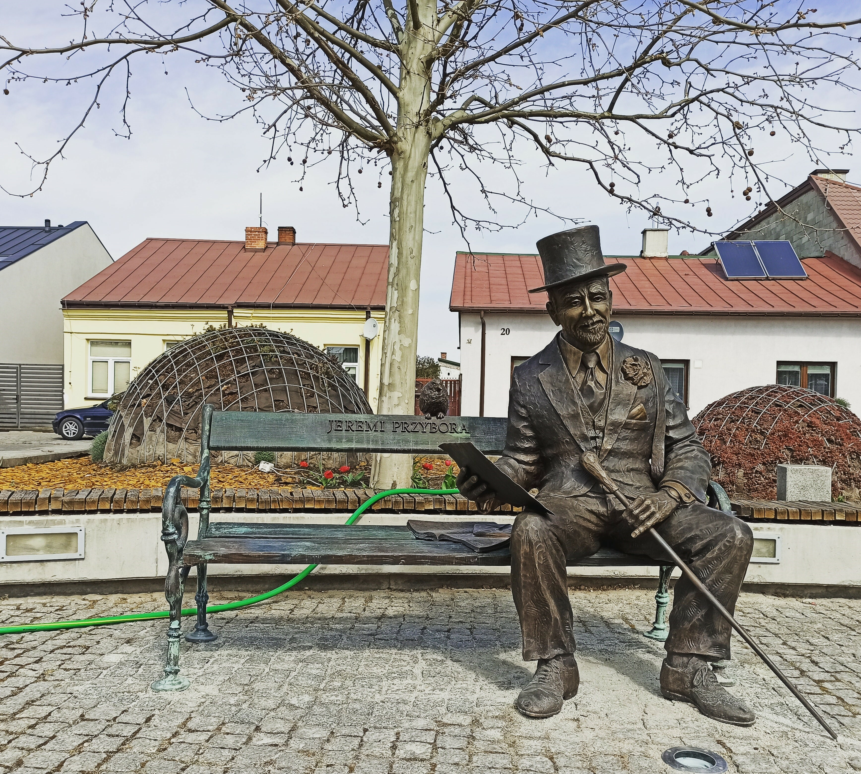 Pomnik ławeczka Jeremiego Przybory, odsłonięta na rynku w Białobrzegach. Nieopodal, w Pacewie, Jeremi Przybora miał dom letniskowy.